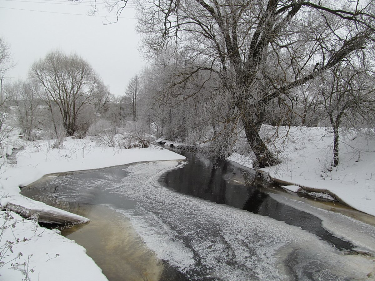 Верабкі. Рака Бярэшча